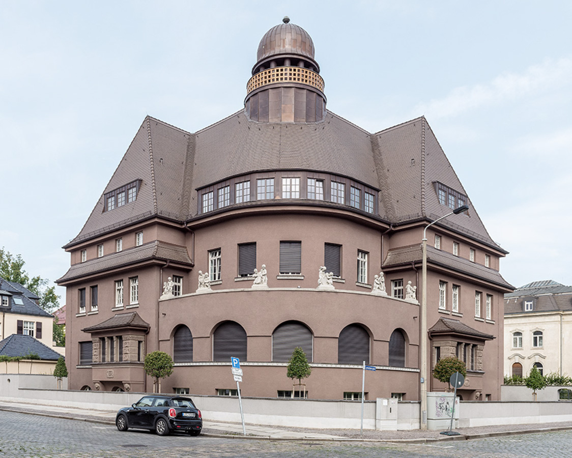 Villa des Unternehmers Ludwig Hupfeld in Leipzig-Gohlis; mit Einfriedung, Vorgarten, Gartenhäuschen und Garagen-Anbau unter Denkmalschutz